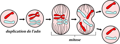 Division cellulaire